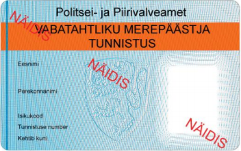 Merepäästja tunnistus